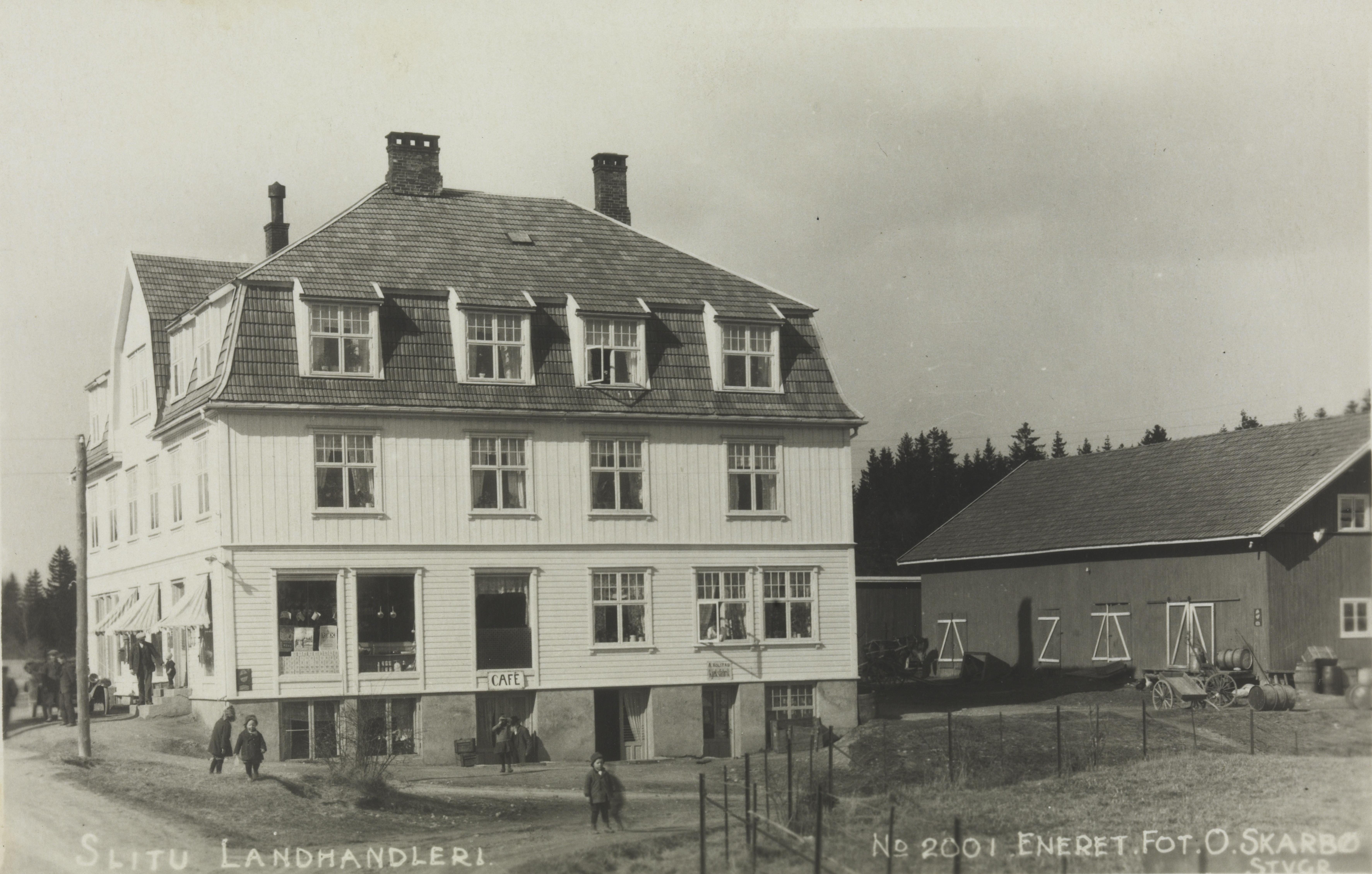 Bildet er hentet fra Nasjonalbibliotekets bildesamling